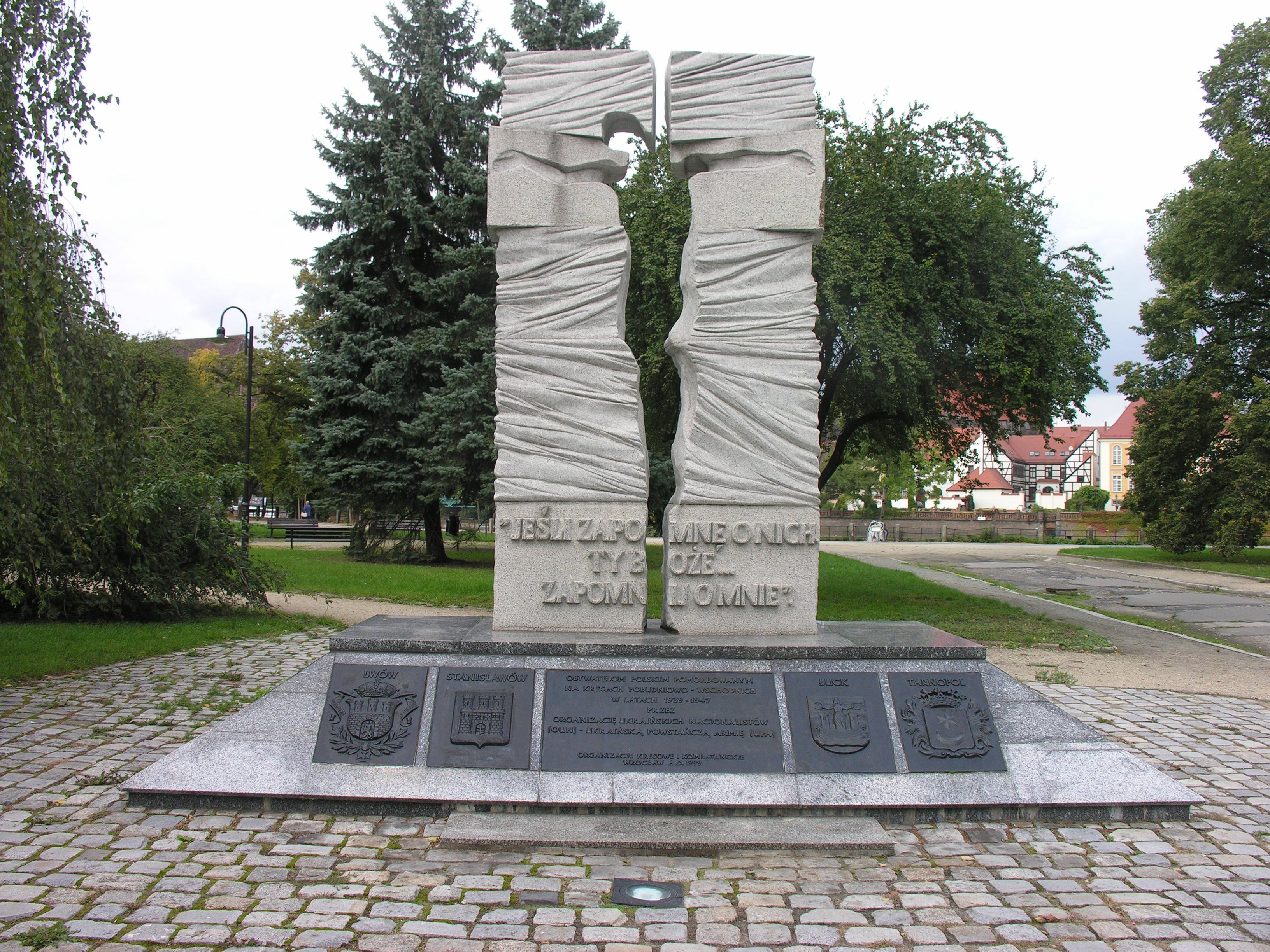 Pomnik ofiar Ukraińskiej Powstańczej Armii na Placu Polskim we Wrocławiu